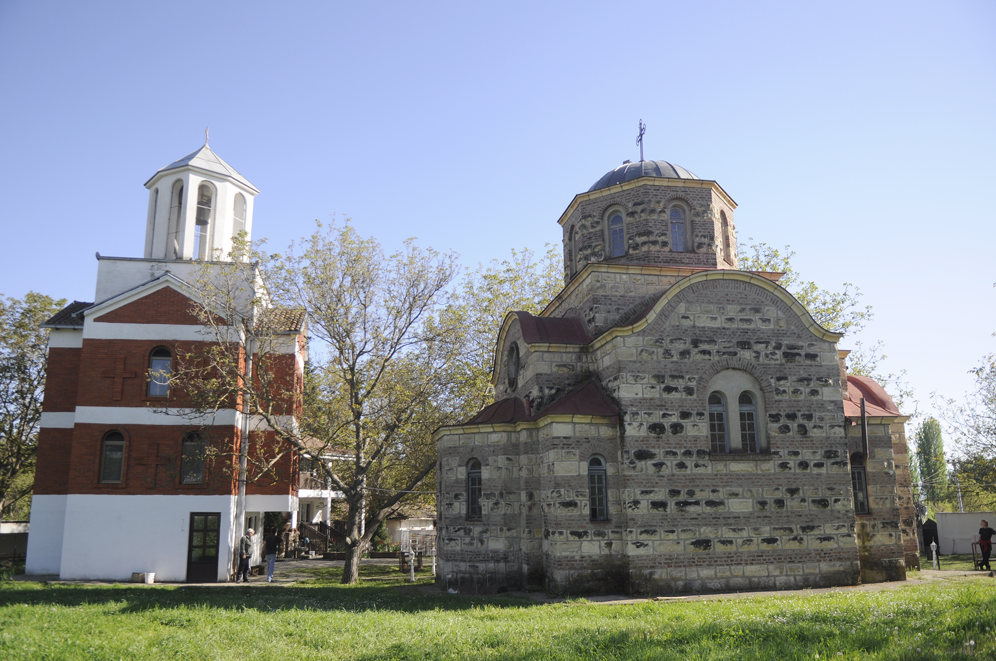 Манастирот „Св. Илија“ во Мирковци